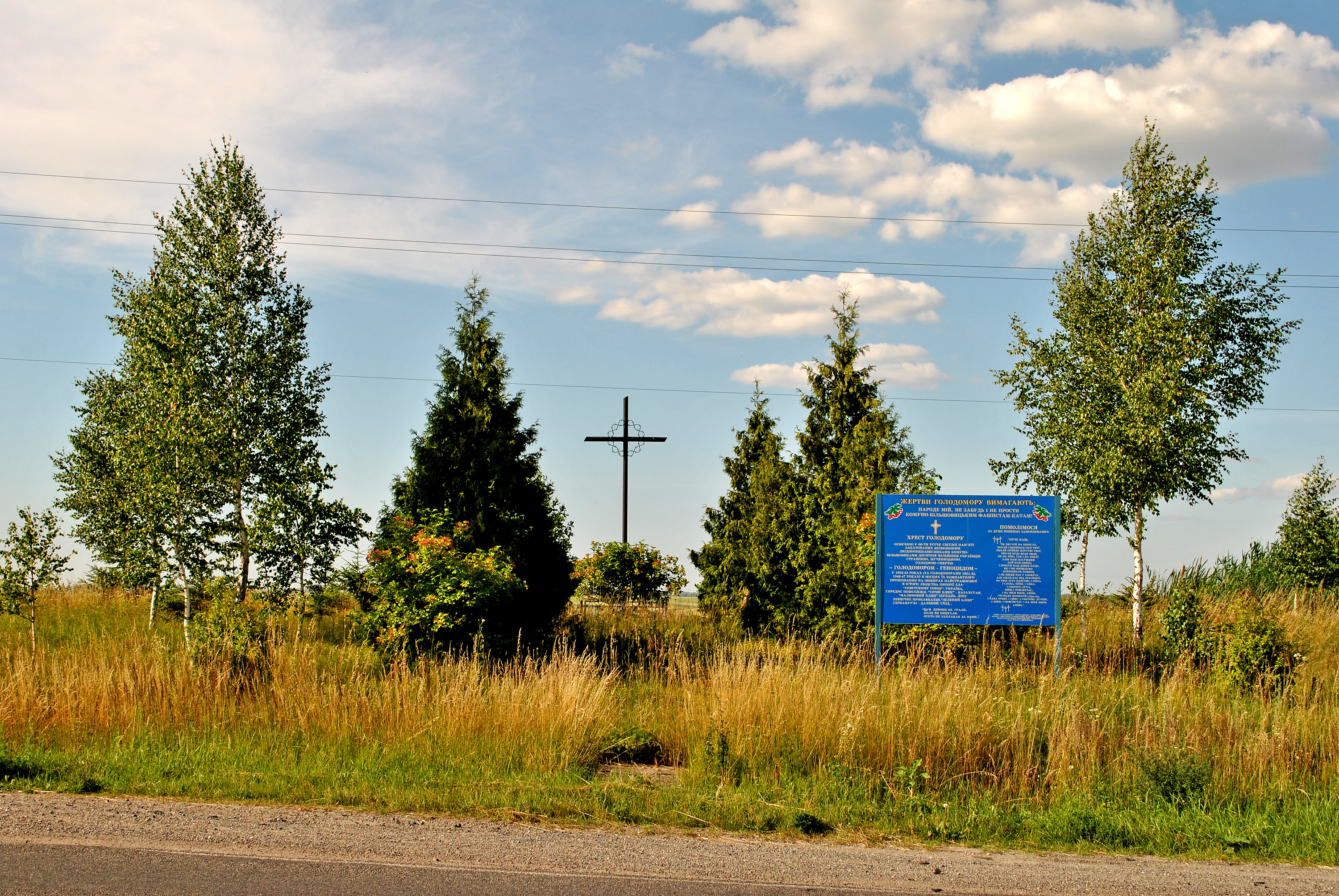 Пам'ятний знак (хрест) жертвам Голодомору 1932—1933 років на північній околиці с. Біла Тернопільськогго району Тернопільської області біля автошляху Автошлях Р 41.